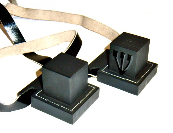 Tfilin